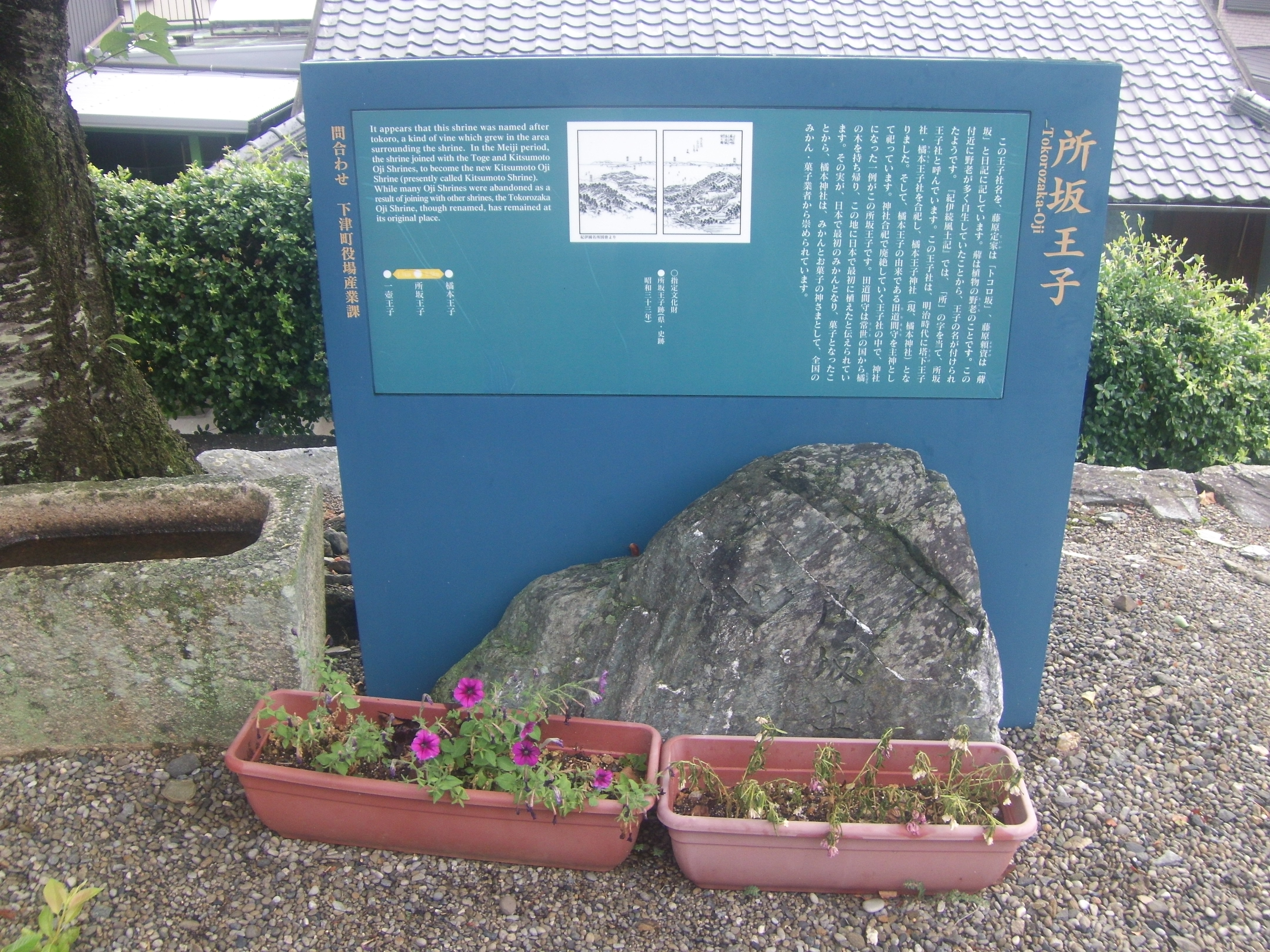 熊野古道・紀伊路の九十九王子の一つ所坂王子、橘本神社境内（和歌山県海南市）